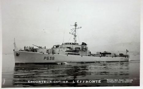 Escorteur côtier L'Effronté' de la Marine nationale